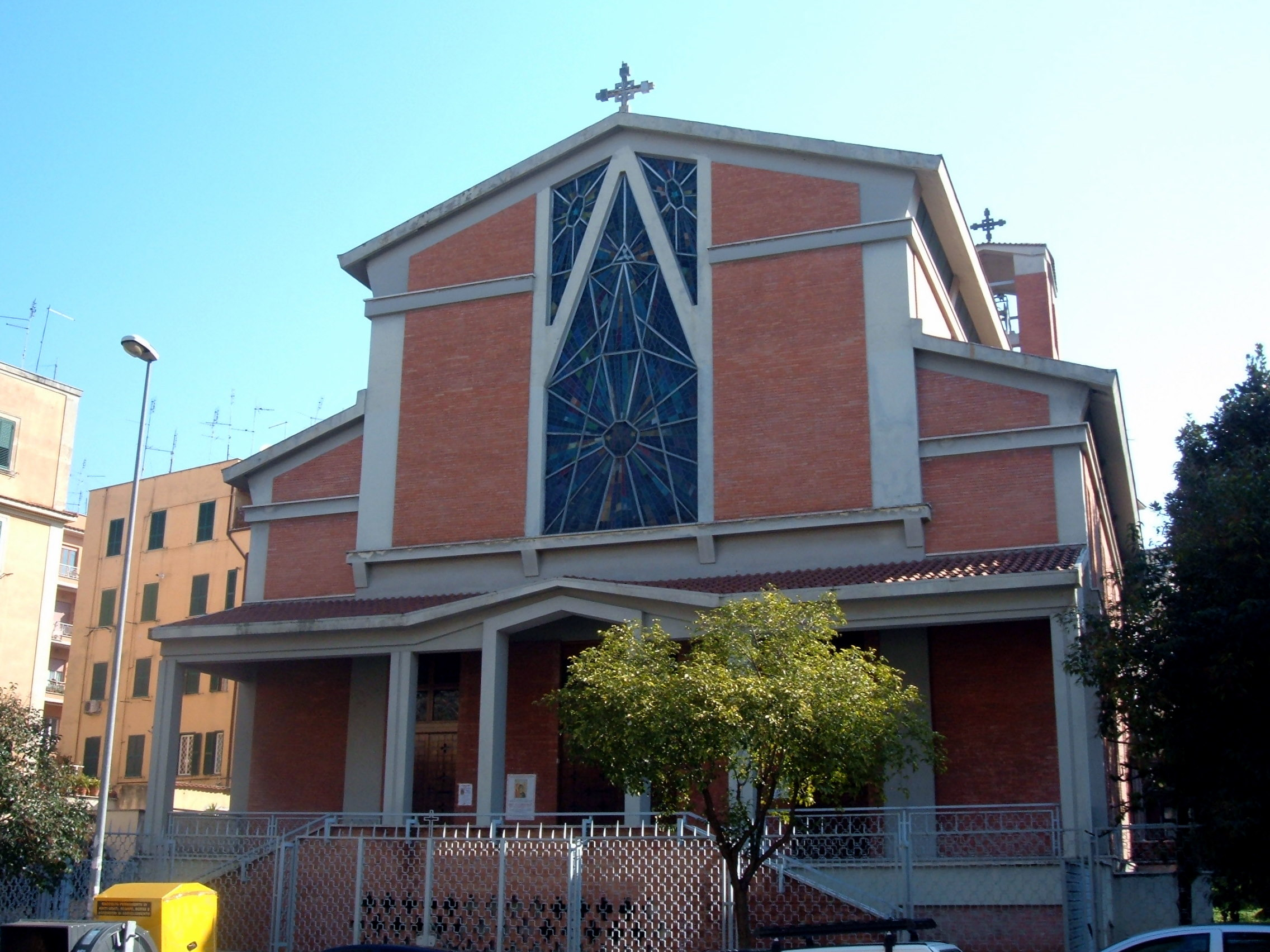 La chiesa dell'istituto di Maria Immacolata, a Roma, in via Tor de' Schiavi, nel quartiere Prenestino-Centocelle.